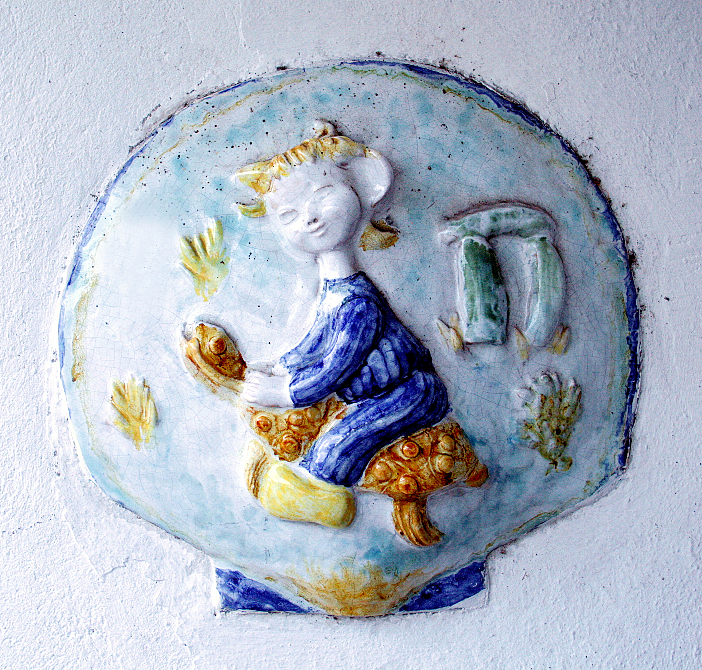 "Le korrigan à la tortue" - Céramique ornant l'entrée d'un restaurant à Quimperlé (Finistère, France).